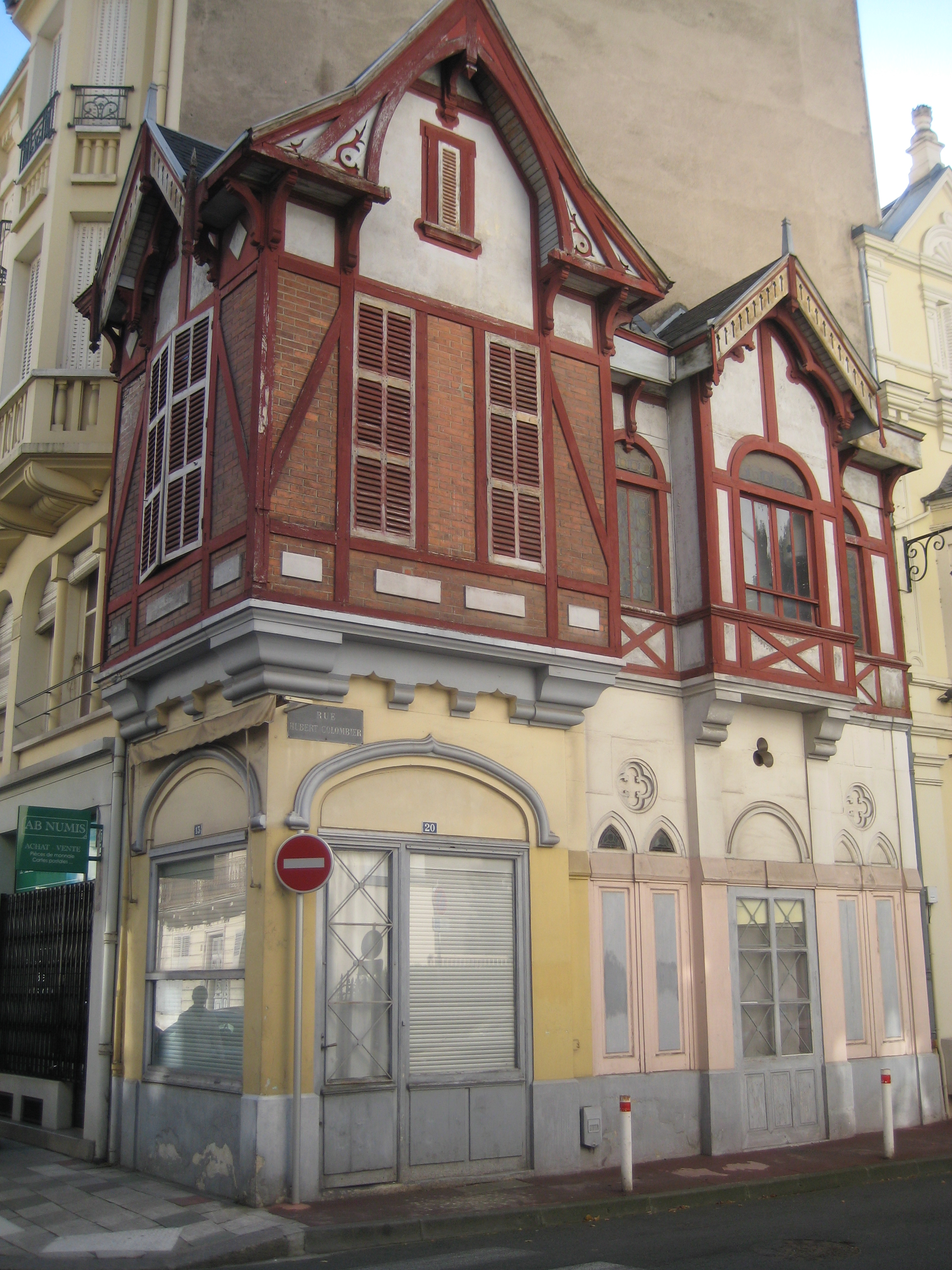 Chalet du gardien de la Villa Jurietti, à Vichy, à l'angle de la rue Foch et de la rue Hubert-Colombier.